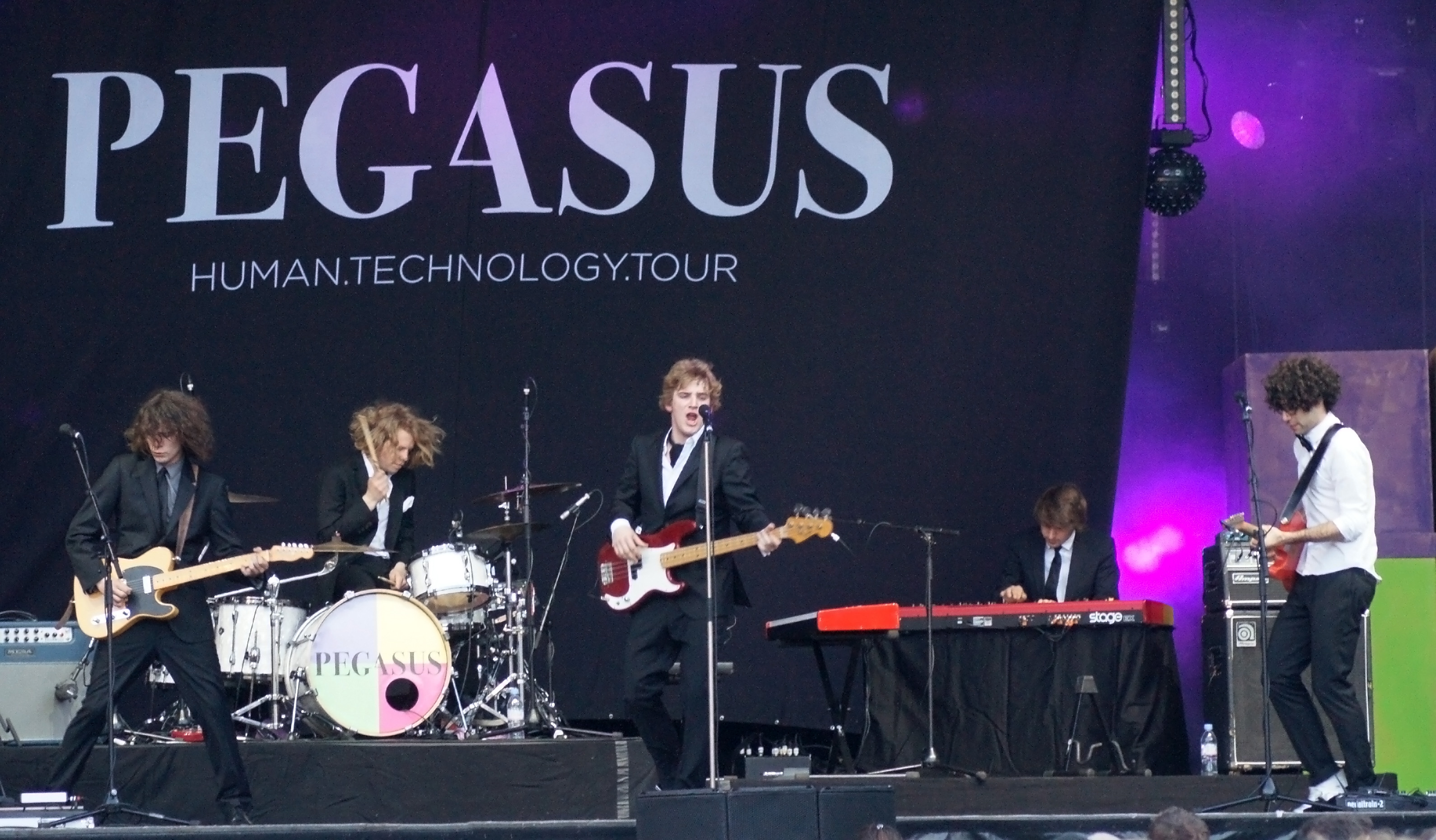 Die Schweizer Band Pegasus am "Stars of Sounds"-Konzert in Aarberg, 1. Juni 2012.